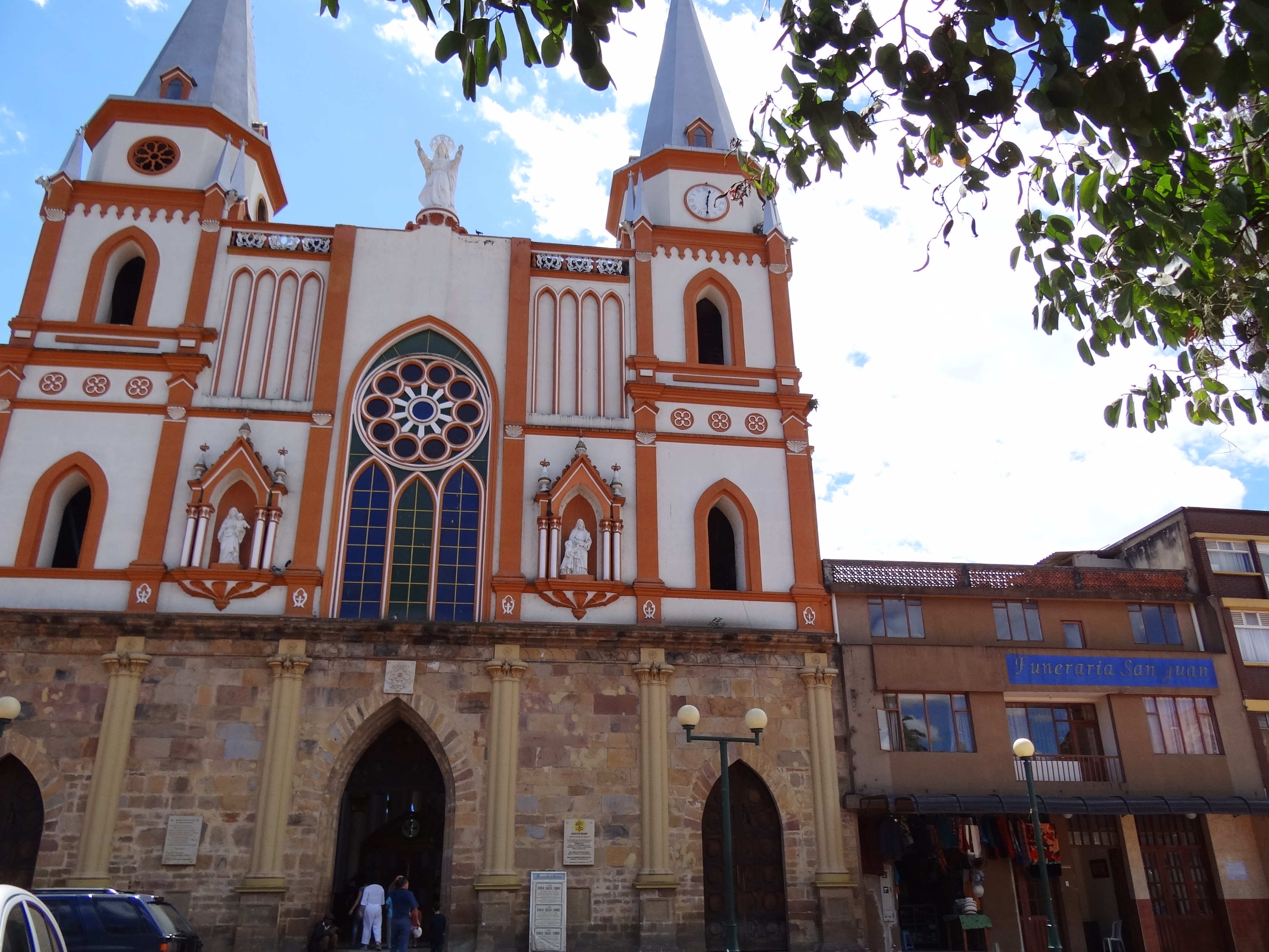 Iglesia Moniquirá, departamento de Boyacá, Colombia